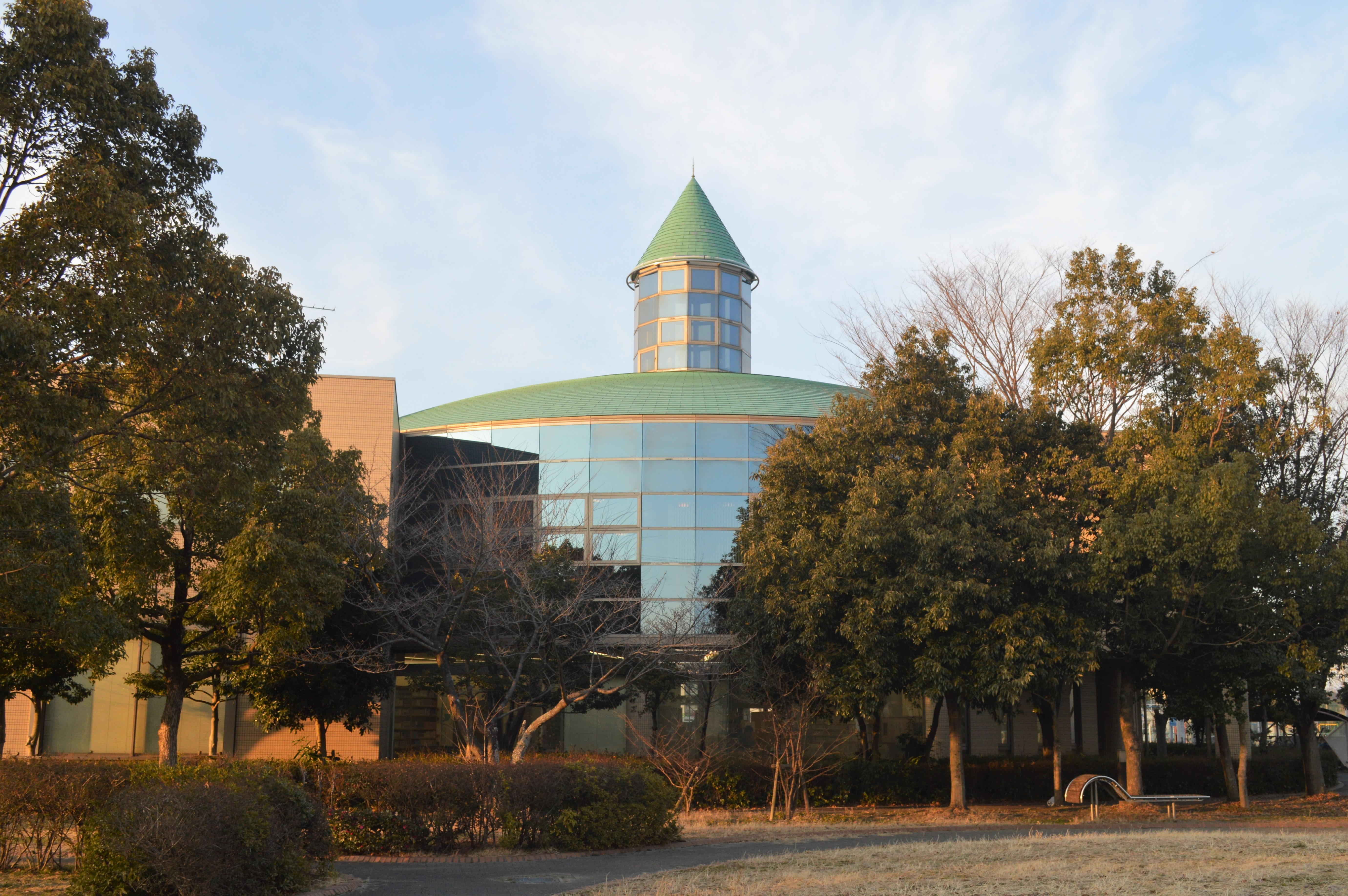 愛知県愛西市の愛西市中央図書館。南側の公園から撮影。